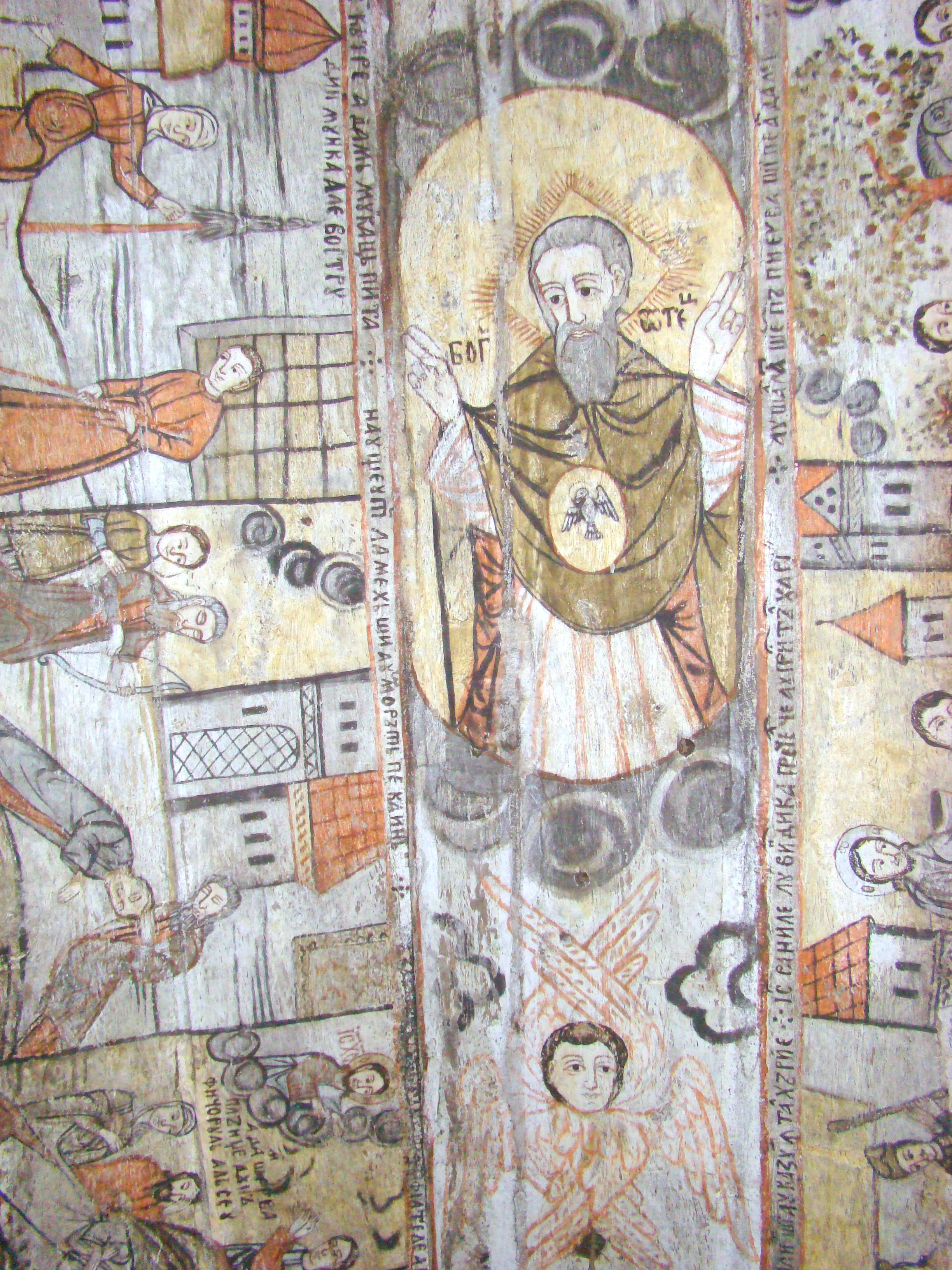 Biserica de lemn „Nașterea Maicii Domnului” din Călinești-Căeni, județul Maramureș